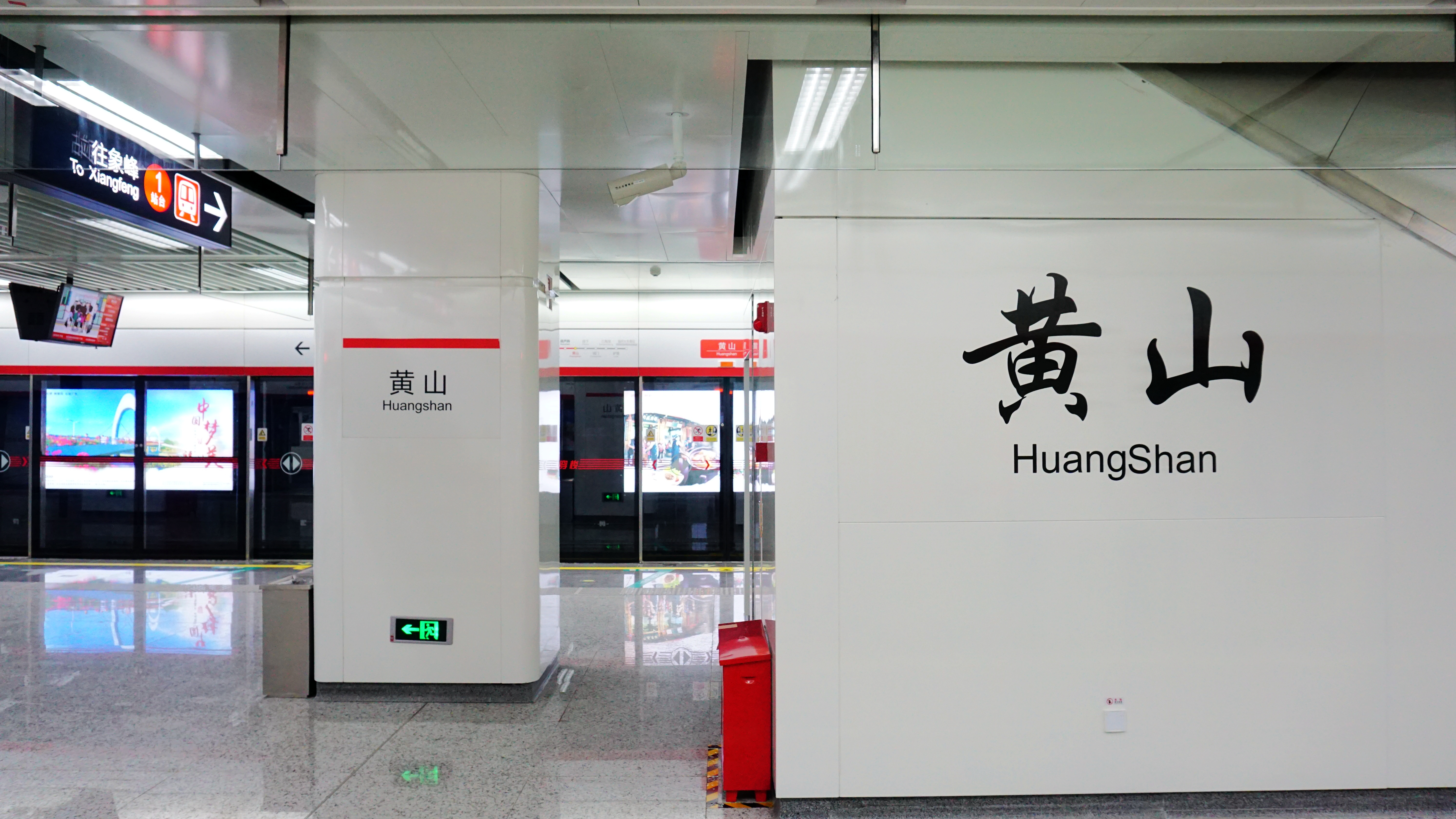 福州地铁黄山站